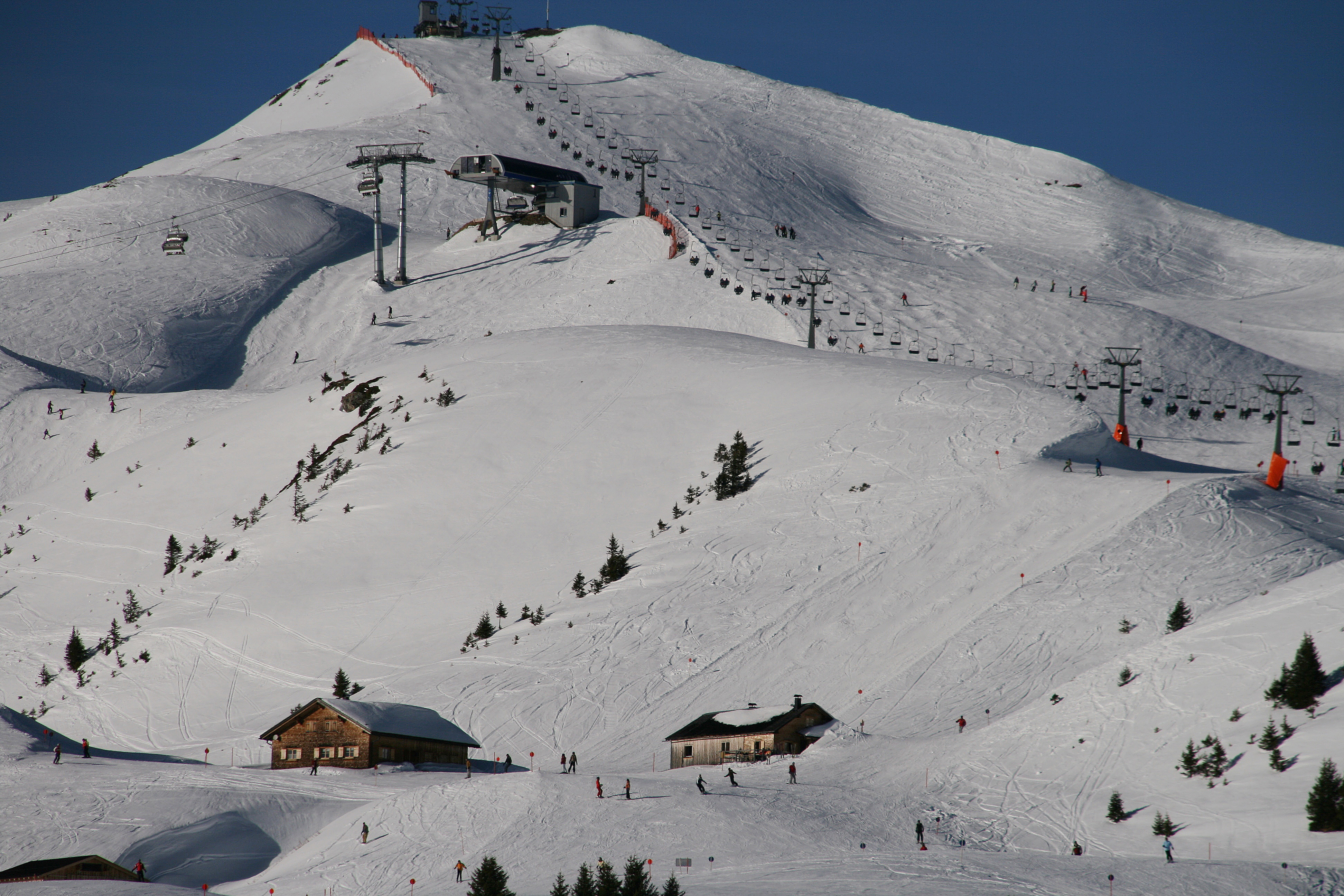 Winter in Damüls Blick auf das Hohe Licht 2009m